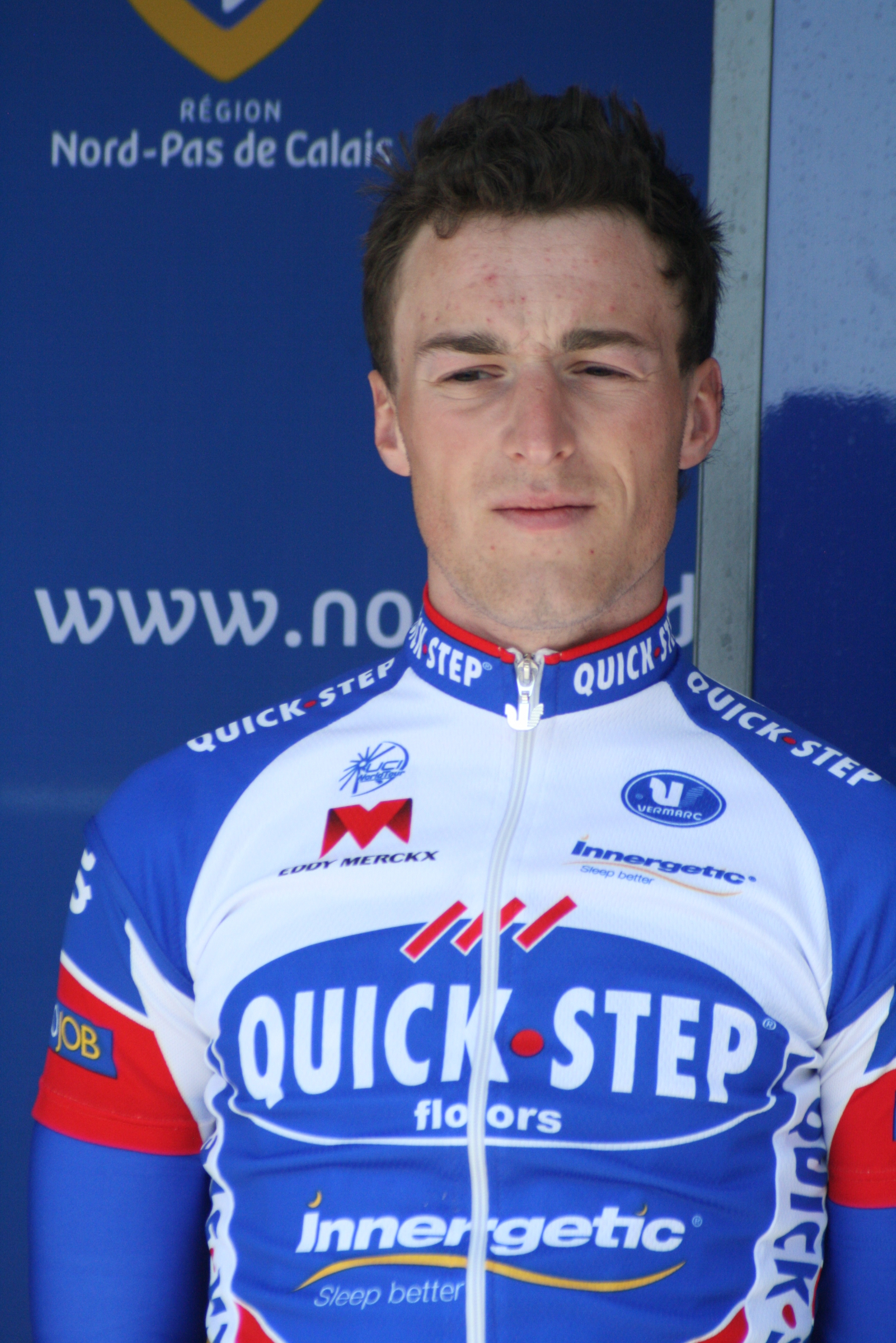 Présentation des coureurs au départ de la première étape Depicted person: Fréderique Robert